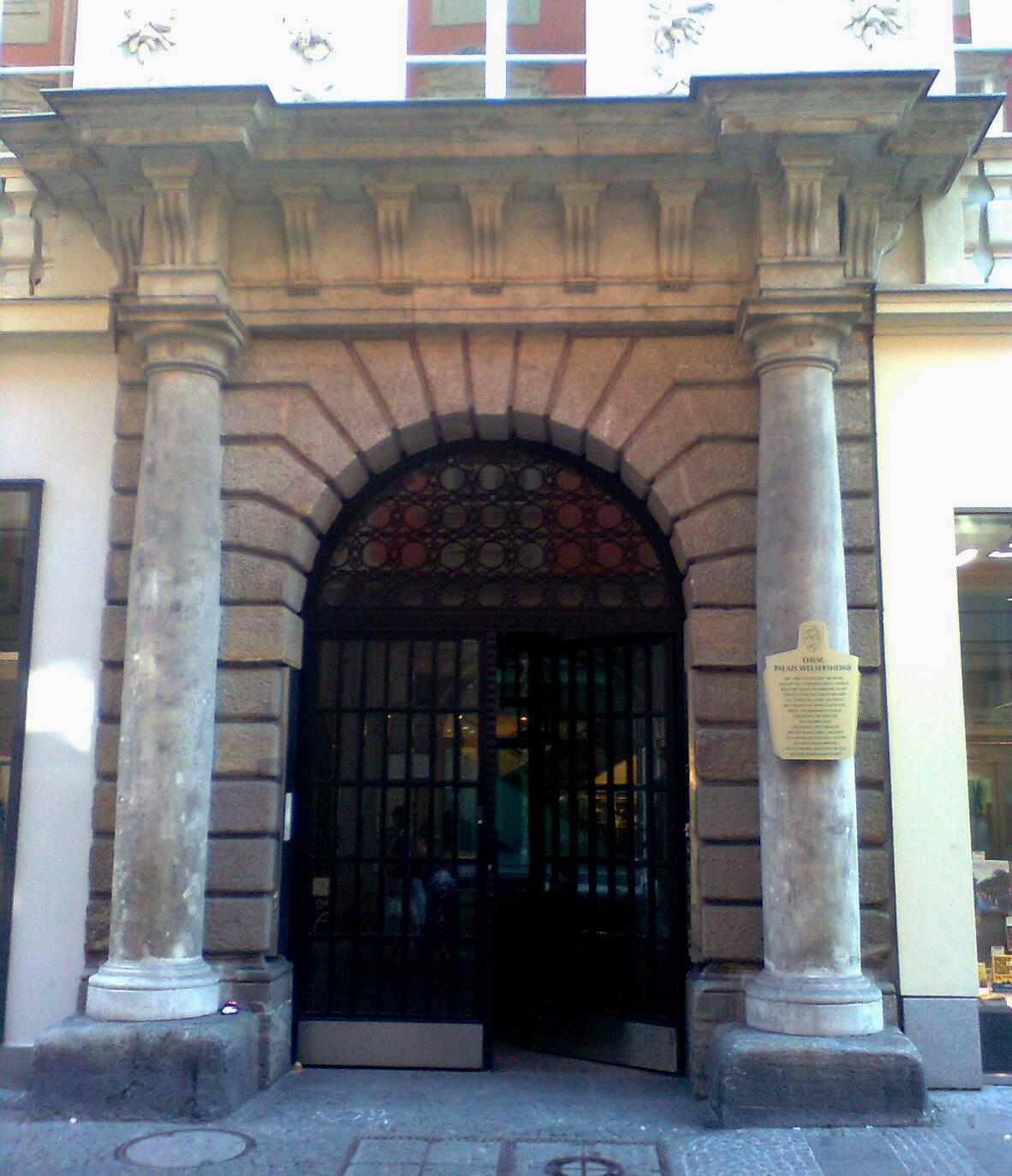 Palais Welsersheimb, Graz, Portal